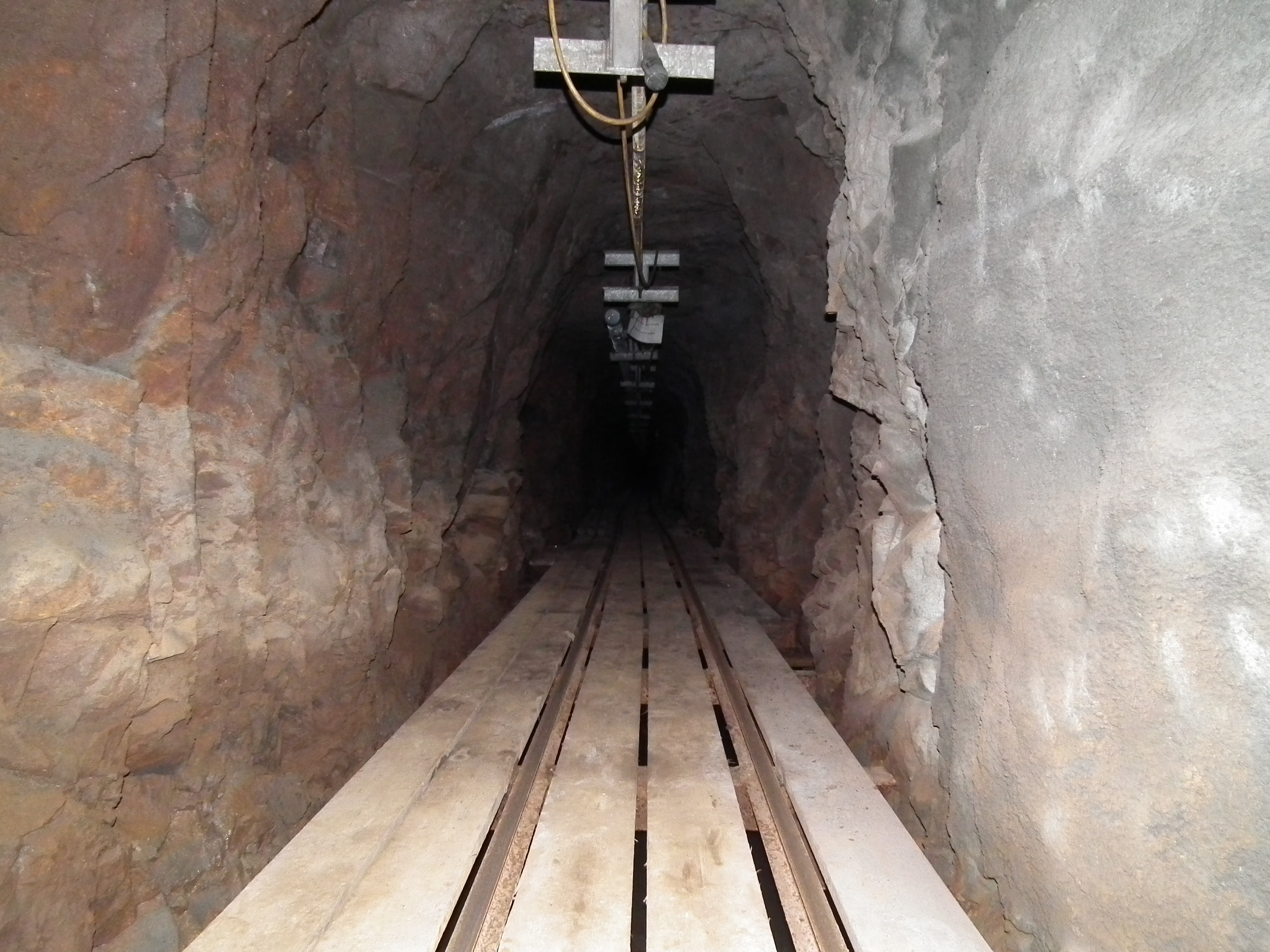 Tiefer Elbstolln, Blick Richtung Nordnordost; Befahrung Wismut-Stollen und Tiefer Elbstolln am 17. September 2015